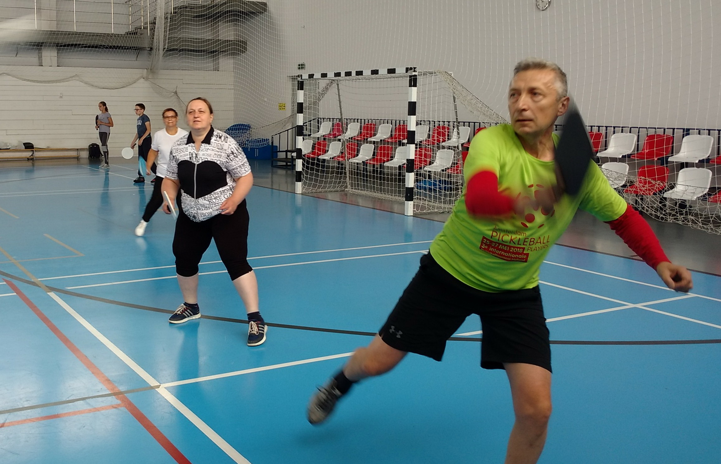 Мастер-класс Тараса Малышевского. Подольск